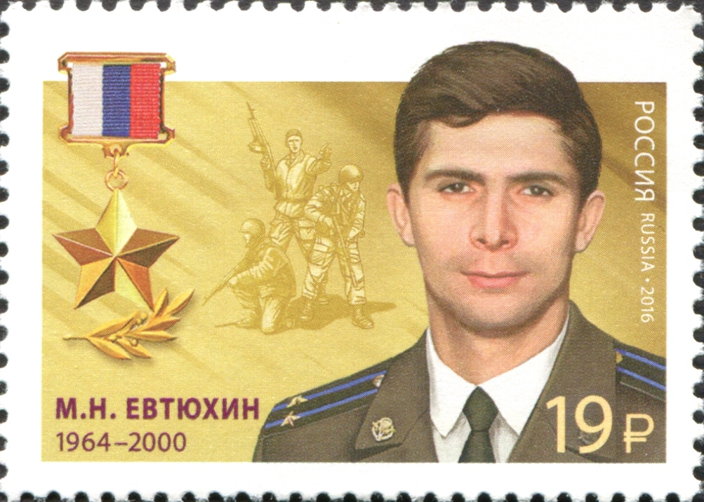 Герой России Евтюхин Марк Николаевич (1964—2000)